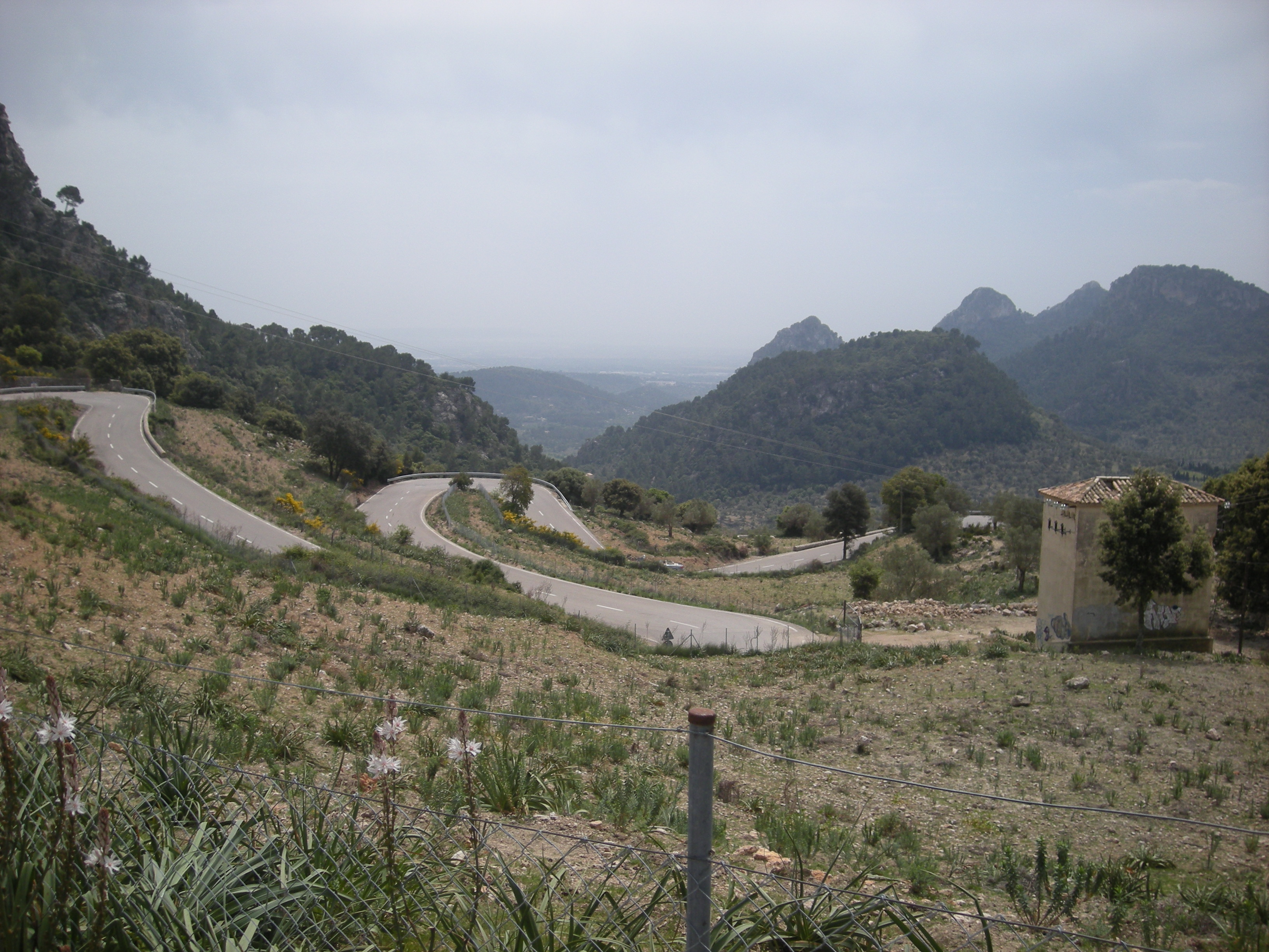 Vessant bunyolina del Coll de Sóller. Carretera Ma-11 A.